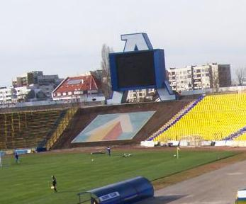 Новото табло на стадион "Георги Аспарухов"